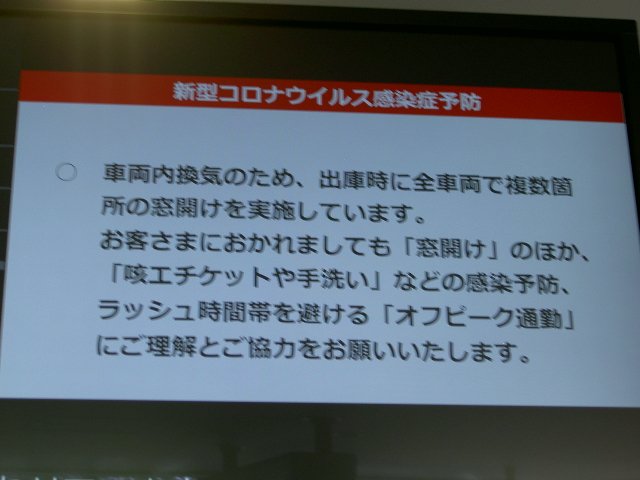 新型コロナウイルスの車内感染防止のため、窓開け換気走行する旨の通知とオフピーク通勤への協力依頼